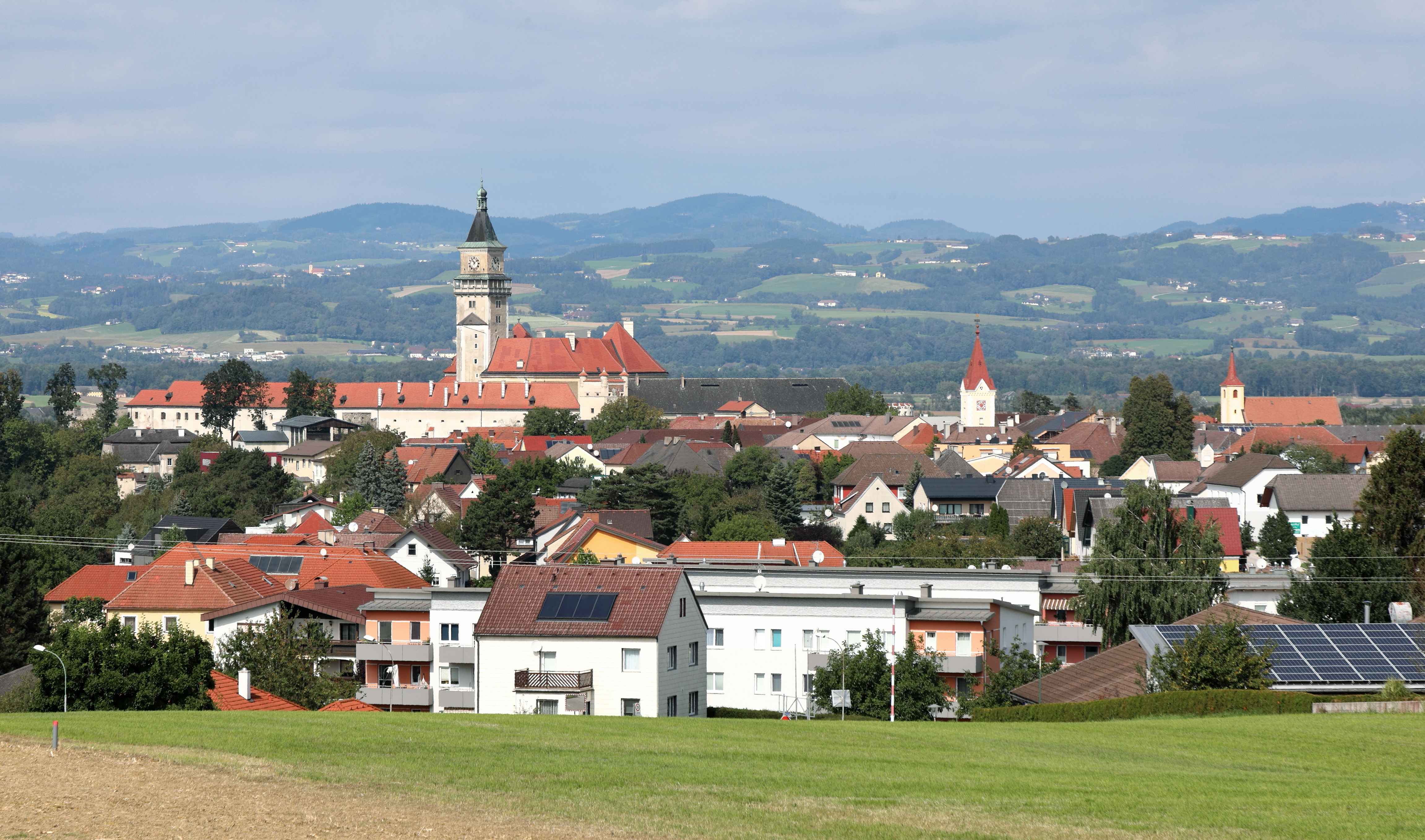 Blick von Sindelburg auf den Ort Wallsee in der niederösterreichischen Marktgemeinde Wallsee-Sindelburg.